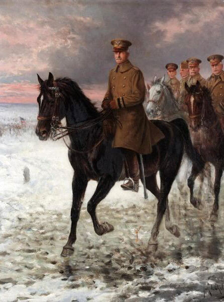 General Pershing, Gemälde von Jan van Chelminski (Ausschnitt)